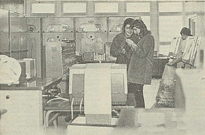 Minsk-22, ZETO Szczecin